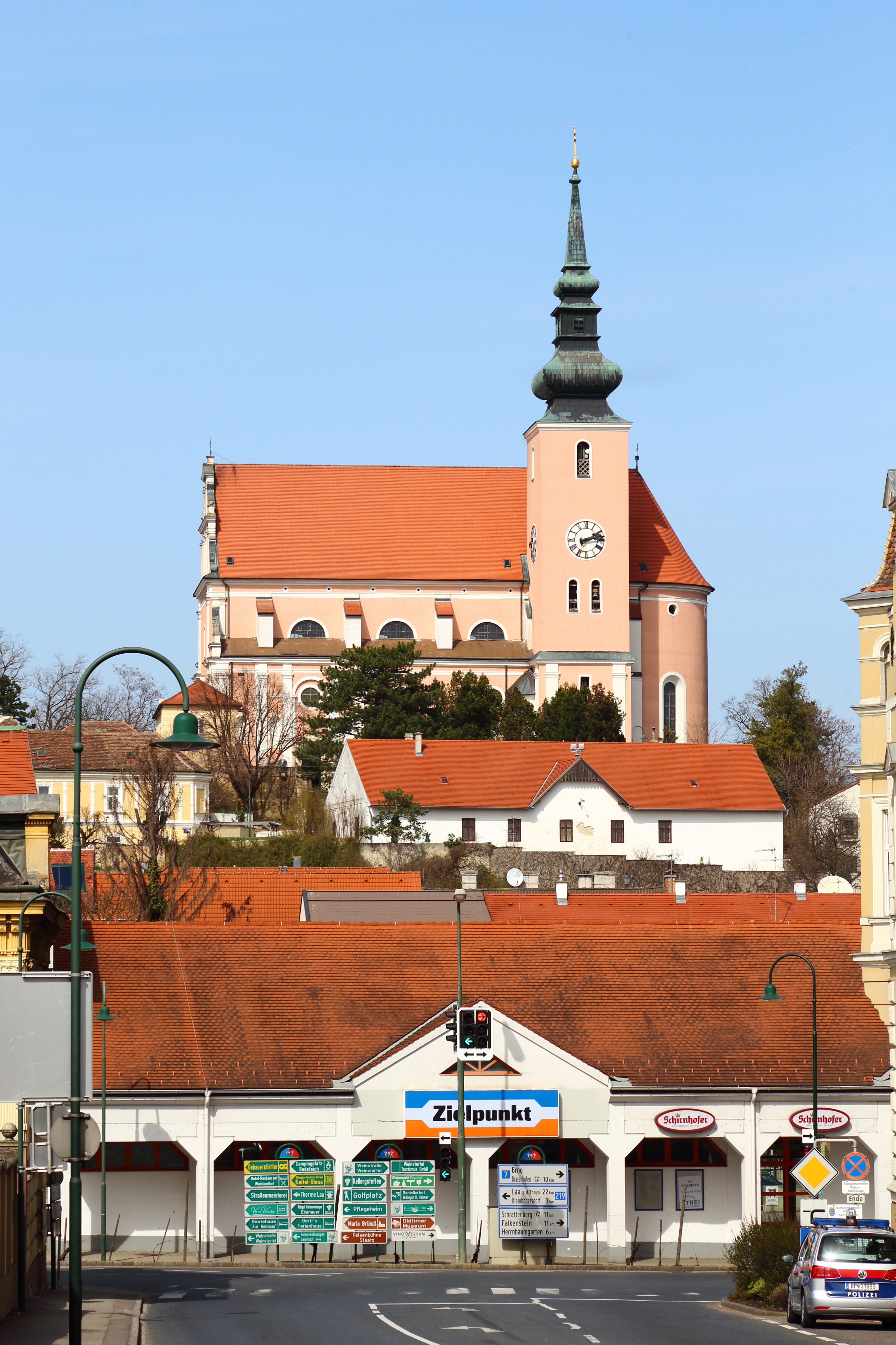 Südansicht der römisch-katholischen Pfarrkirche hl. Johannes der Täufer in der niederösterreichischen Stadt Poysdorf.Die in erhöhter Lage im Norden des Ortes errichtete Kirche ist ein frübarocker Bau. Er wurde von 1629 bis 1635 errichtet, im Jahr 1640 geweiht und ist von Resten einer wehrhaften Kirchenmauer umgeben. Der Turm wurde 1864 neu erbaut.